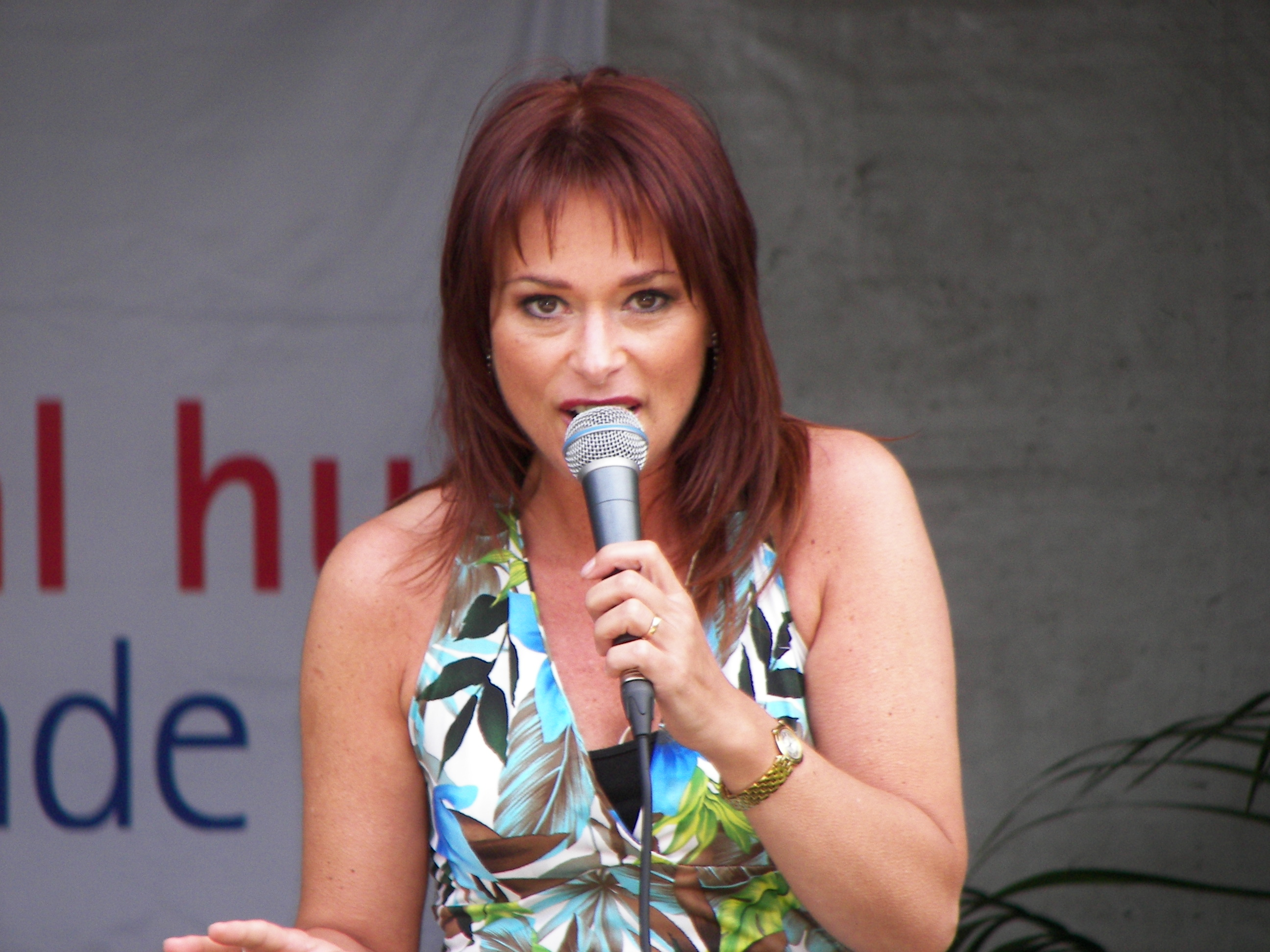 Hierbij de zangeres Lisa del Bo, Ze heeft meegedaan aan eurosong met liefde is een kaartspel & vlinder. Hierdoor werd ze grote deels bekend. Eerder deed ze mee aan de songmixfestival en werd ze eerste.